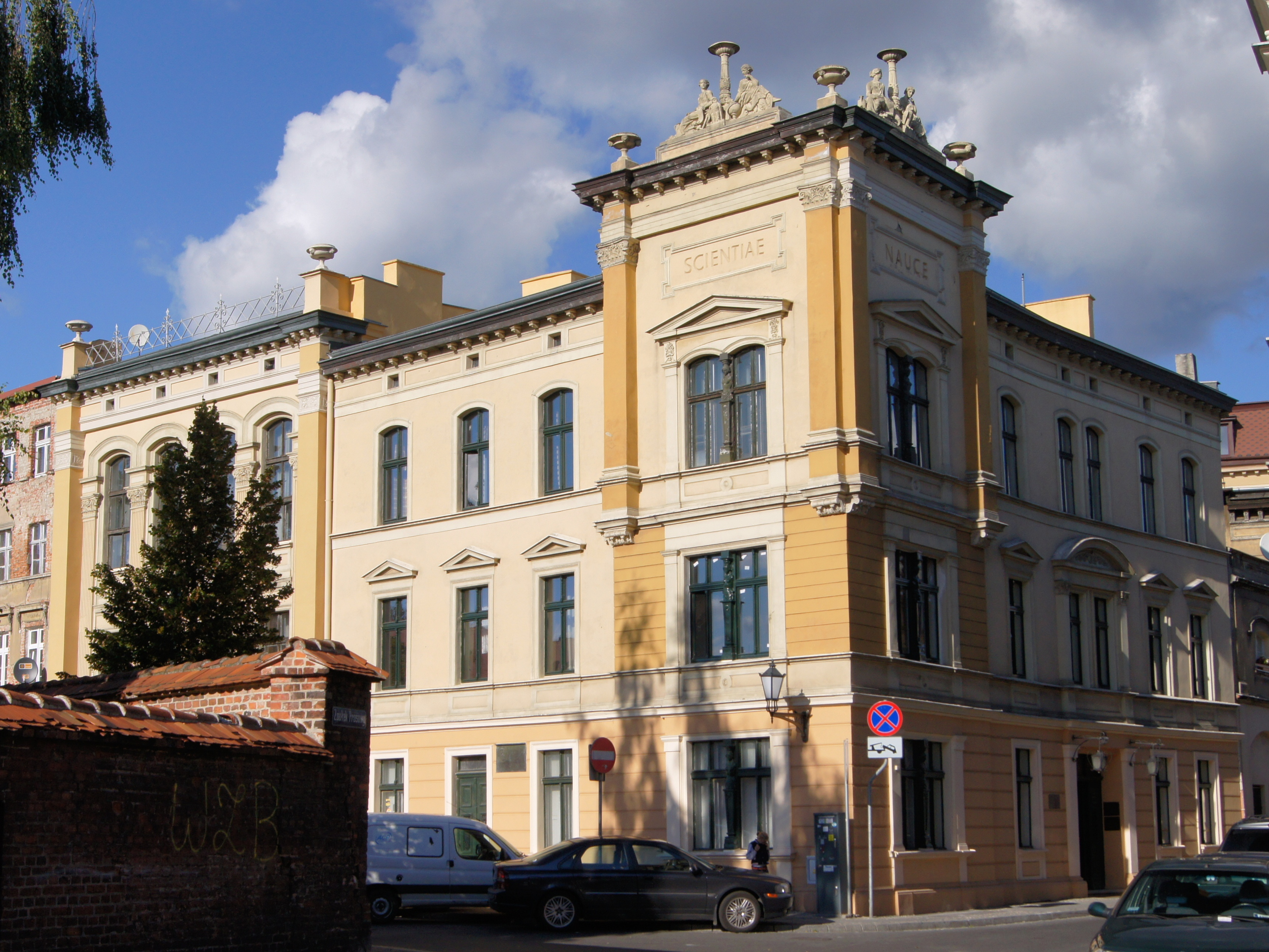 Toruń, ul. Wysoka 16 - budynek Toruńskiego Towarzystwa Naukowego, następnie „Książnica Miejska”, 1881-1882 (zabytek nr A/94)